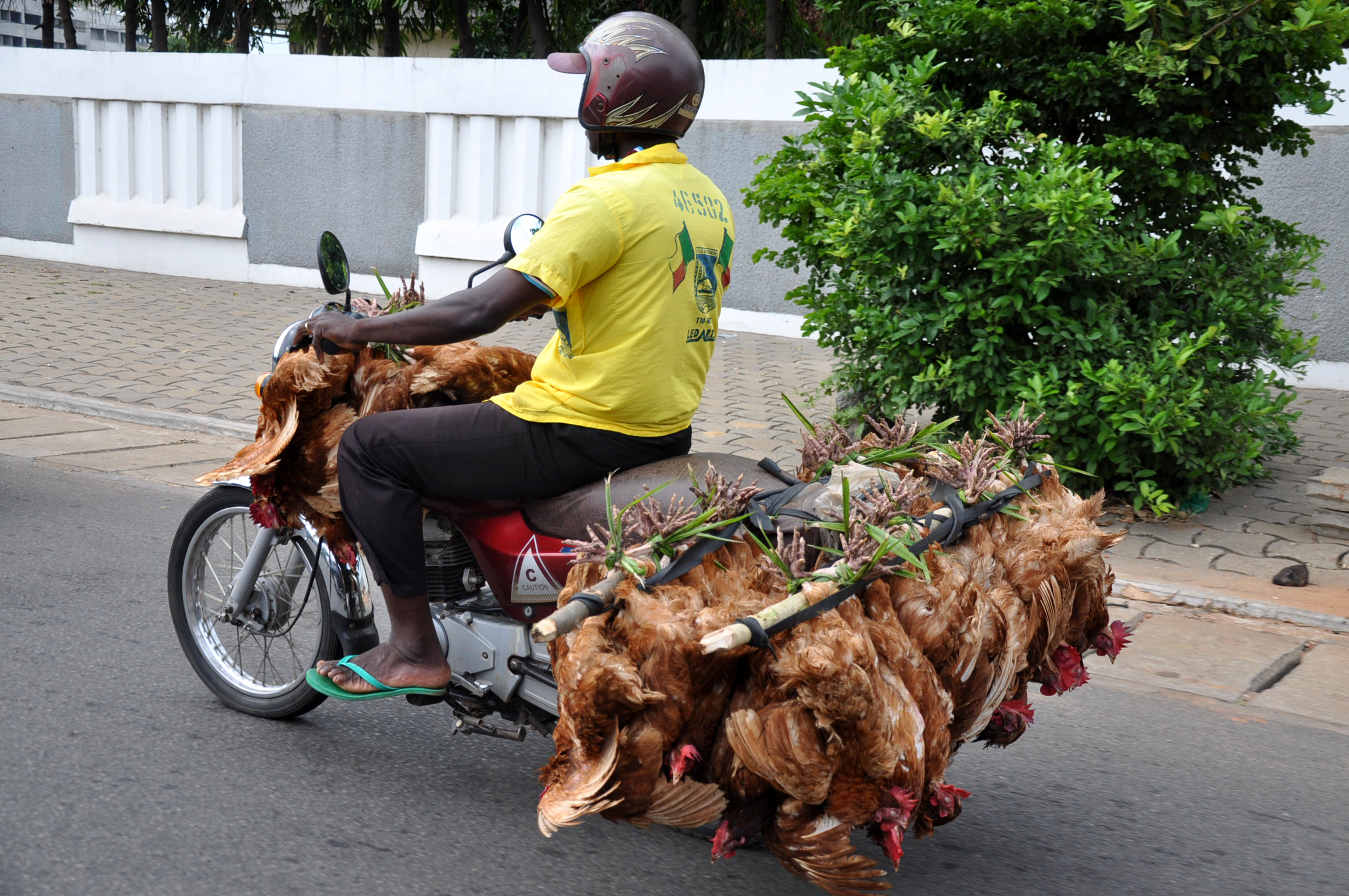 the holidays promise to be beautiful and good with the sale of chickens This is an image with the theme "Africa on the Move or Transport" from: Benin